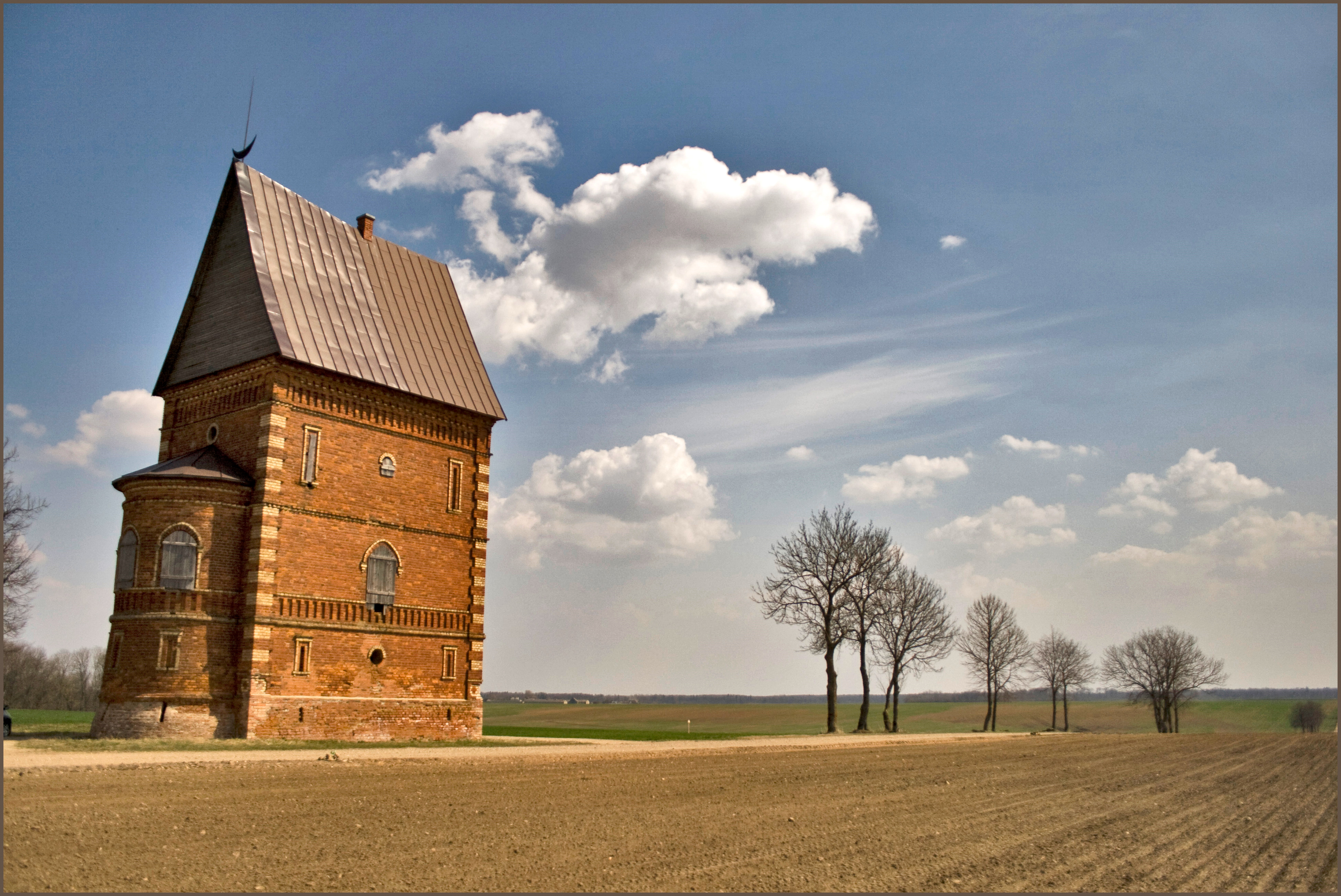 Labūnava